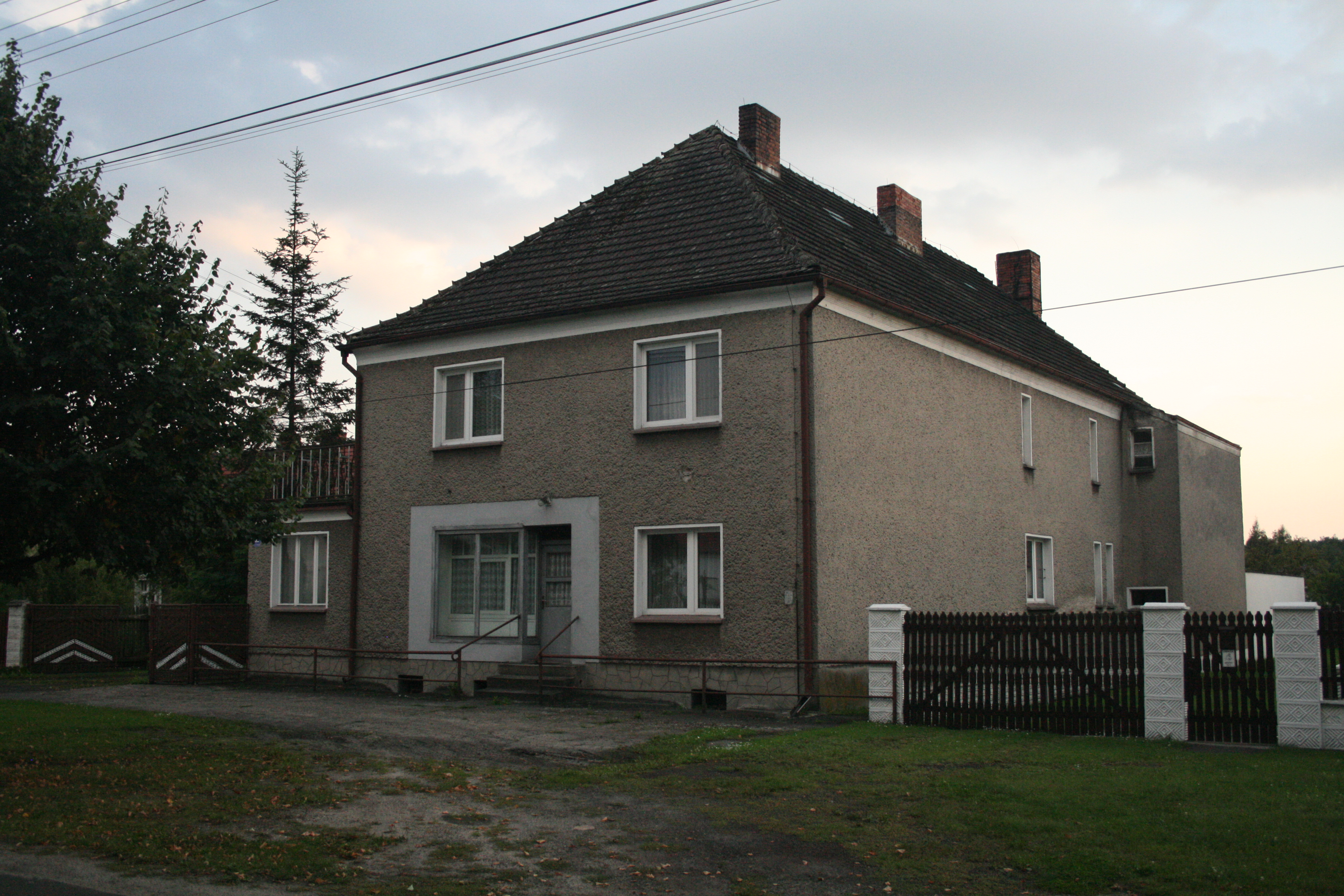 Piekarnia przy ul. Pawlety włącznie z budynkiem mieszkalnym, Suchy Bór